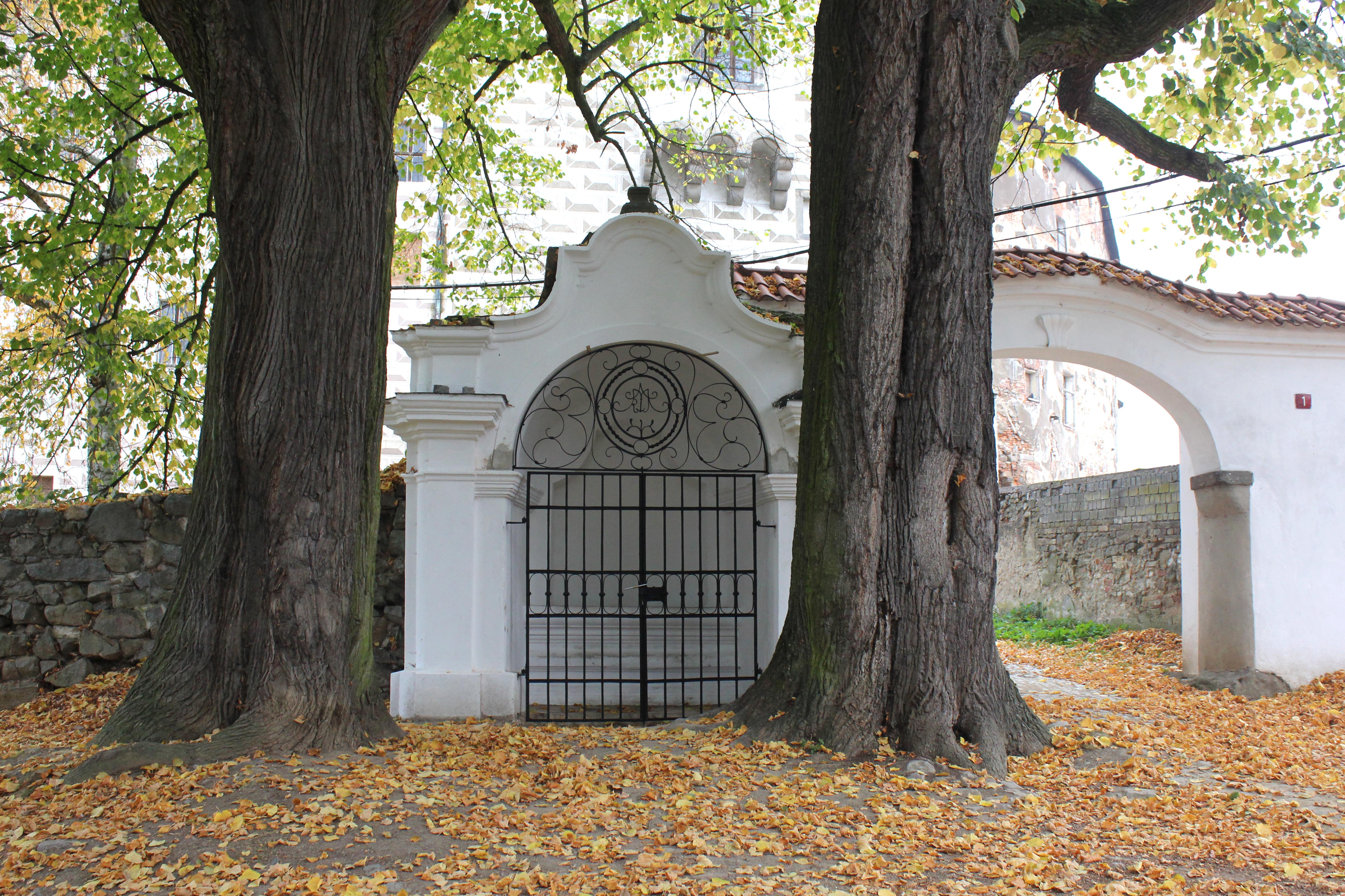 Kaplička svaté Anny